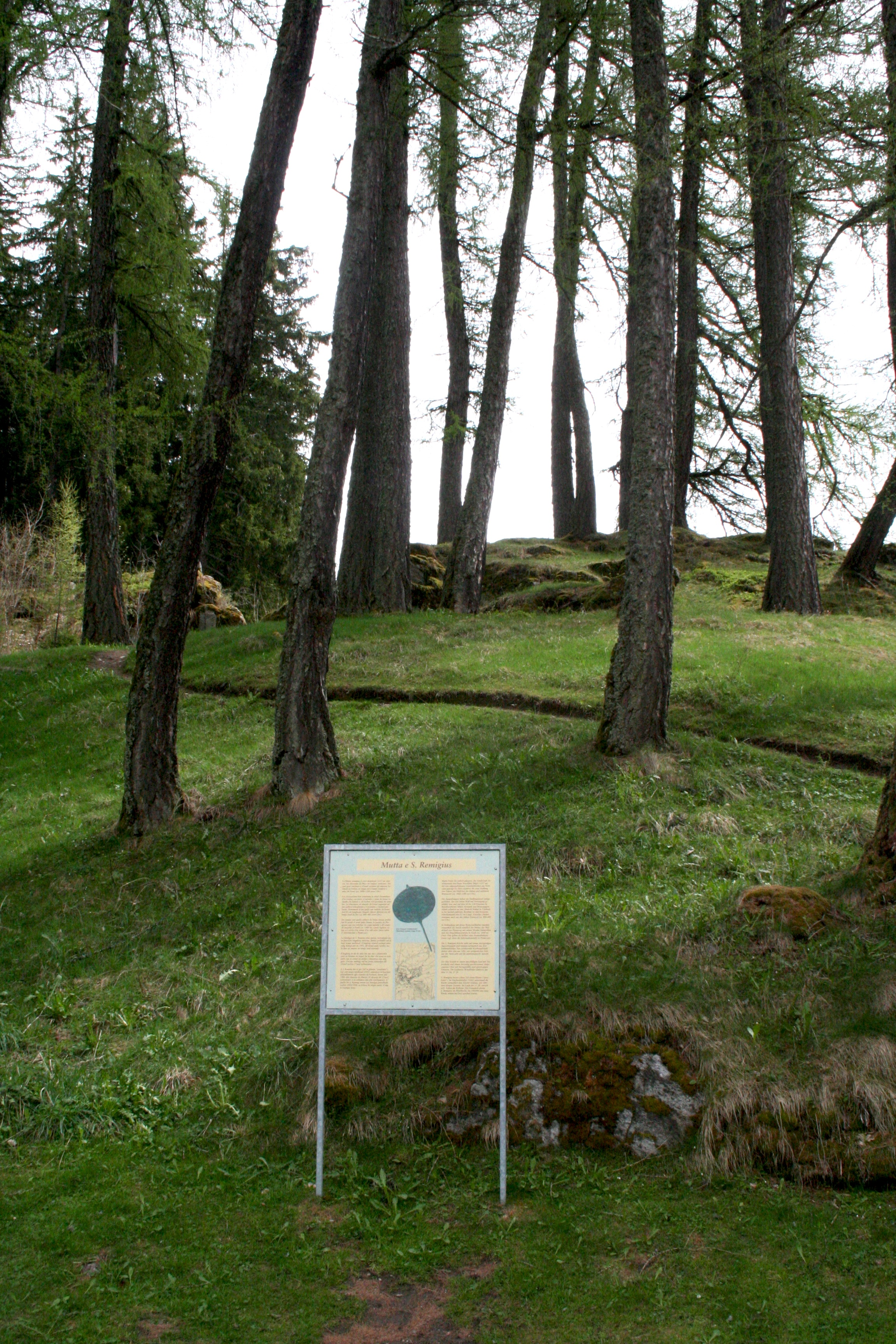 Parc la Mutta: Infotafel vor der Mutta